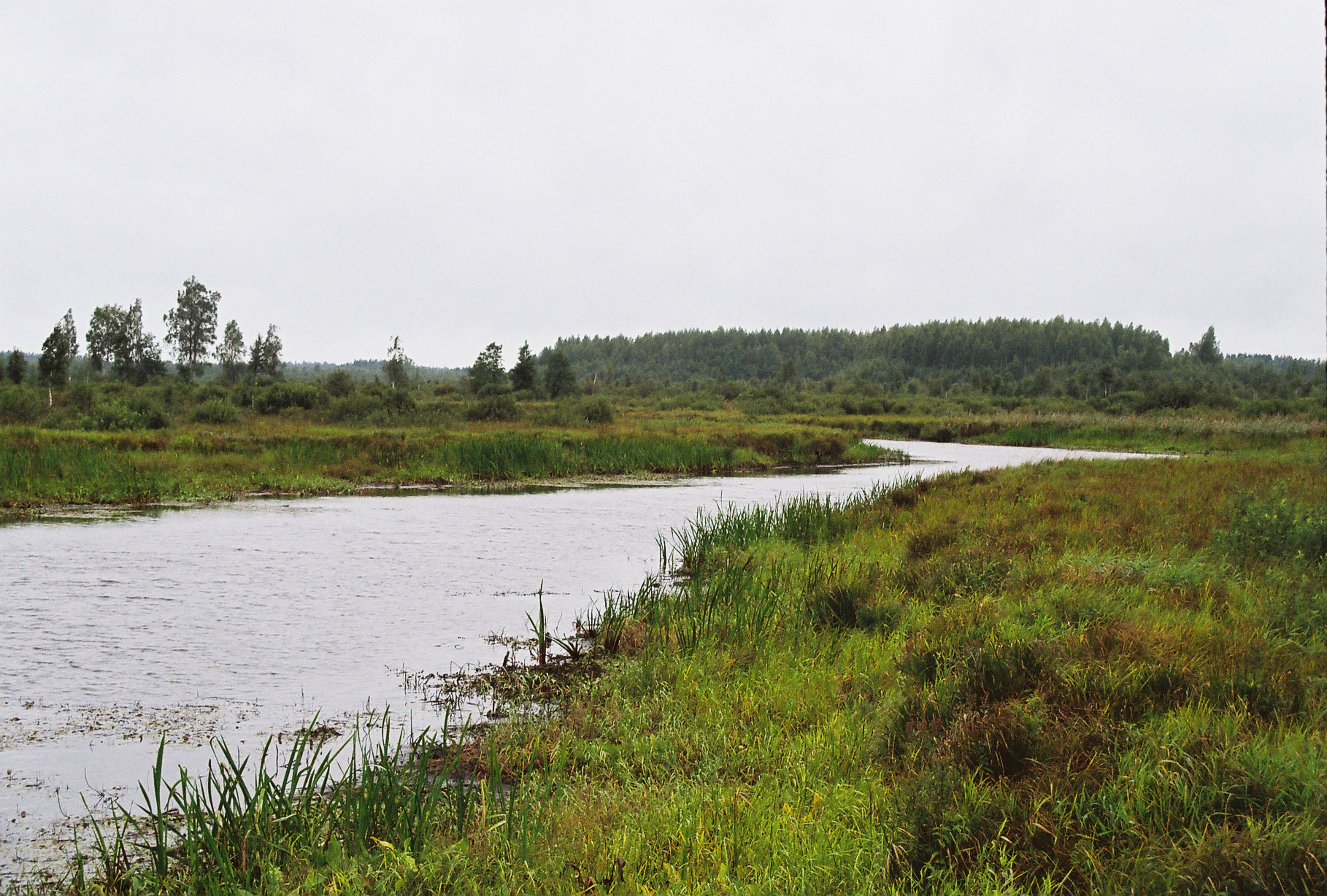 Apna jõgi Emajõe Suursoos